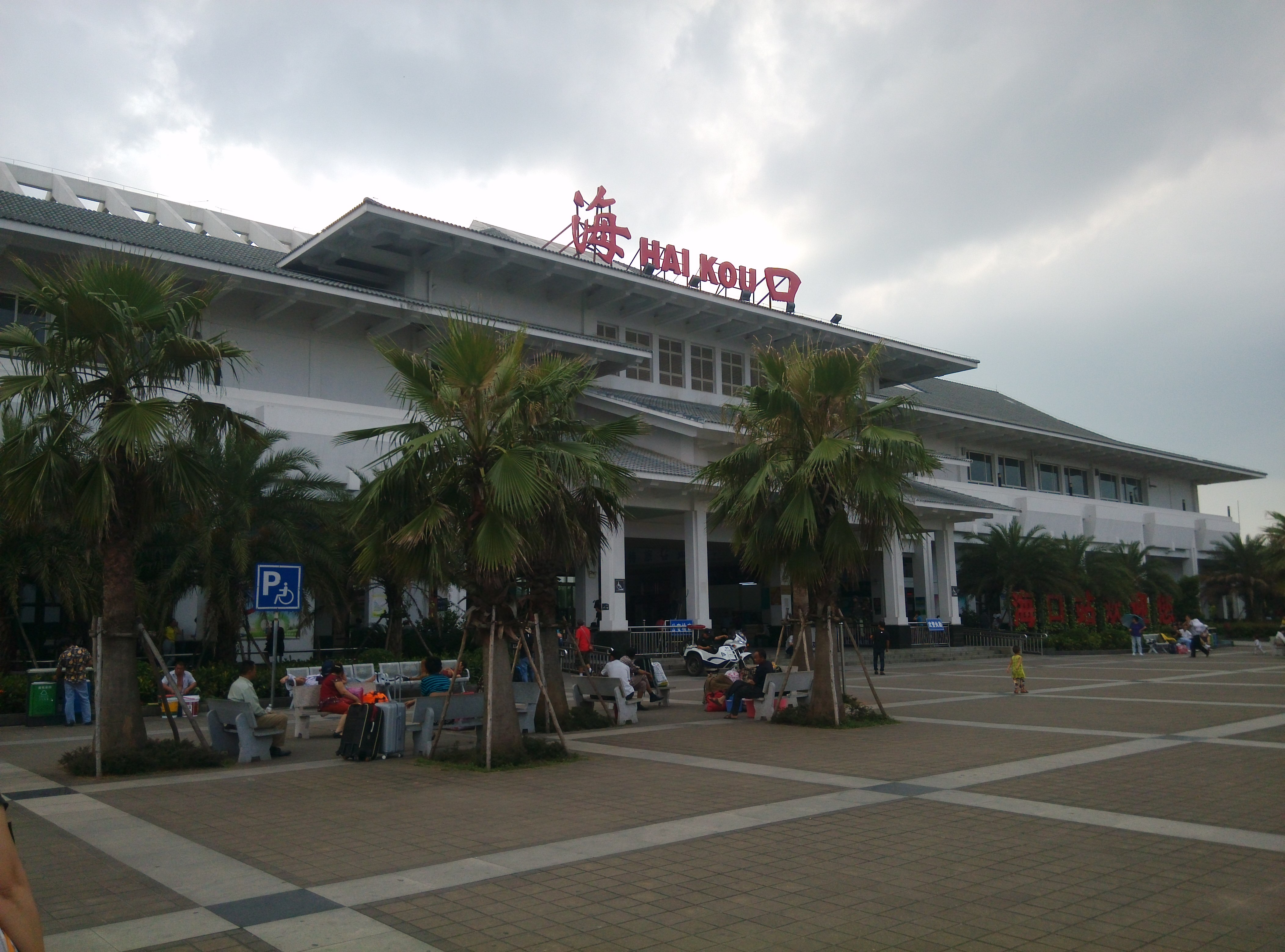 粤海線海口駅駅舎。